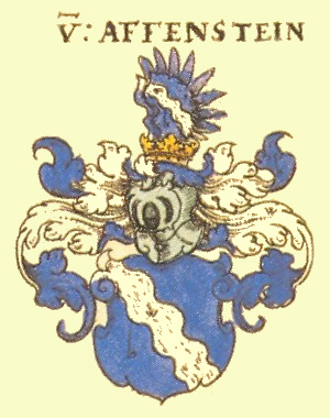 Wappen der Rheinländischen Adelsfamilie Affenstein